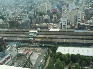 中野サンプラザ20階からの駅全景（2003年6月3日撮影）